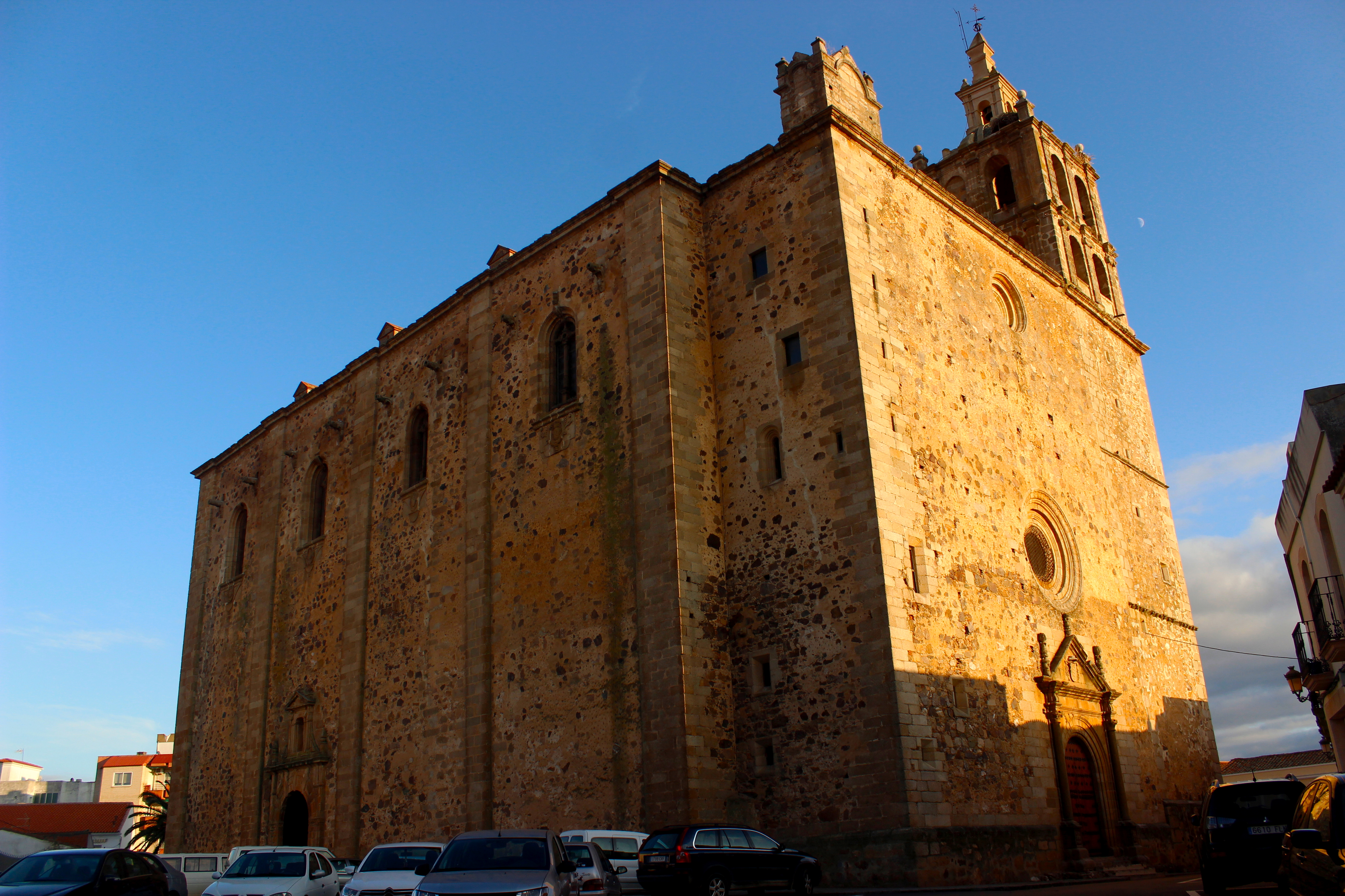 Iglesia Parroquial de Santa María (Guareña, Badajoz, España). Construida entre 1557-1625. Fotografiada en diciembre de 2019.